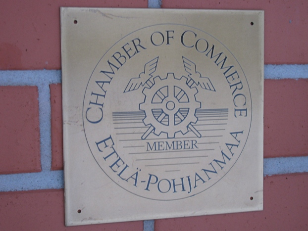 Etelä-Pohjanmaan kauppakamarin perinteinen jäsenlaatta